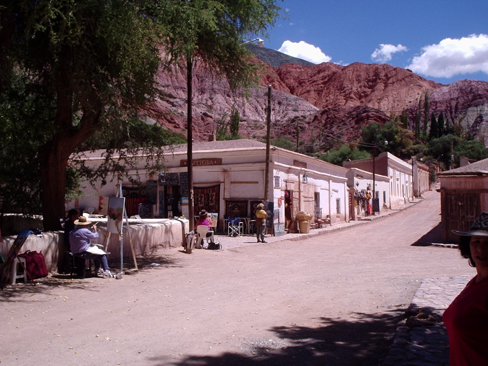 Purmamarca, Prov. de Jujuy, Argentina.